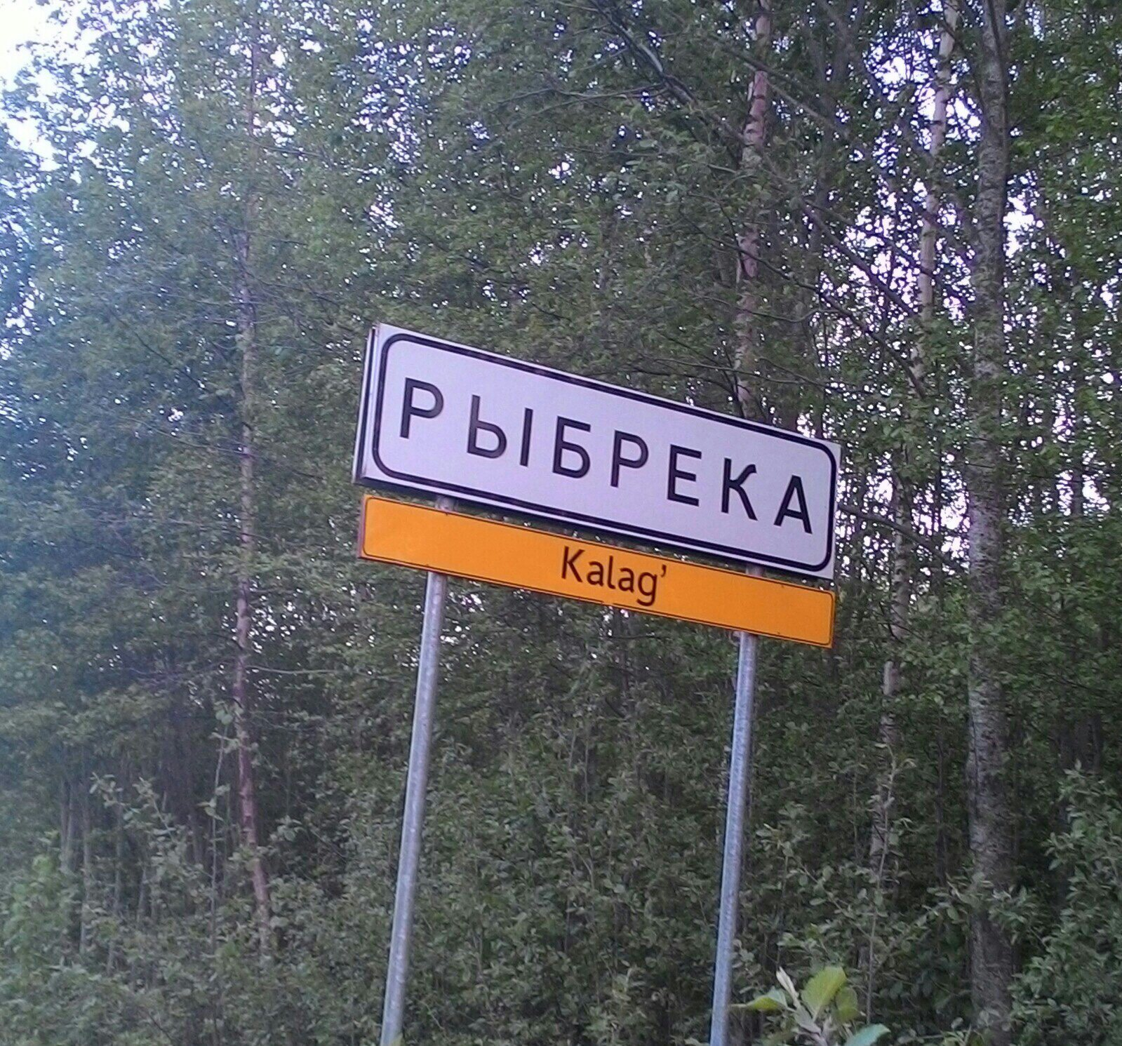 Дорожный знак